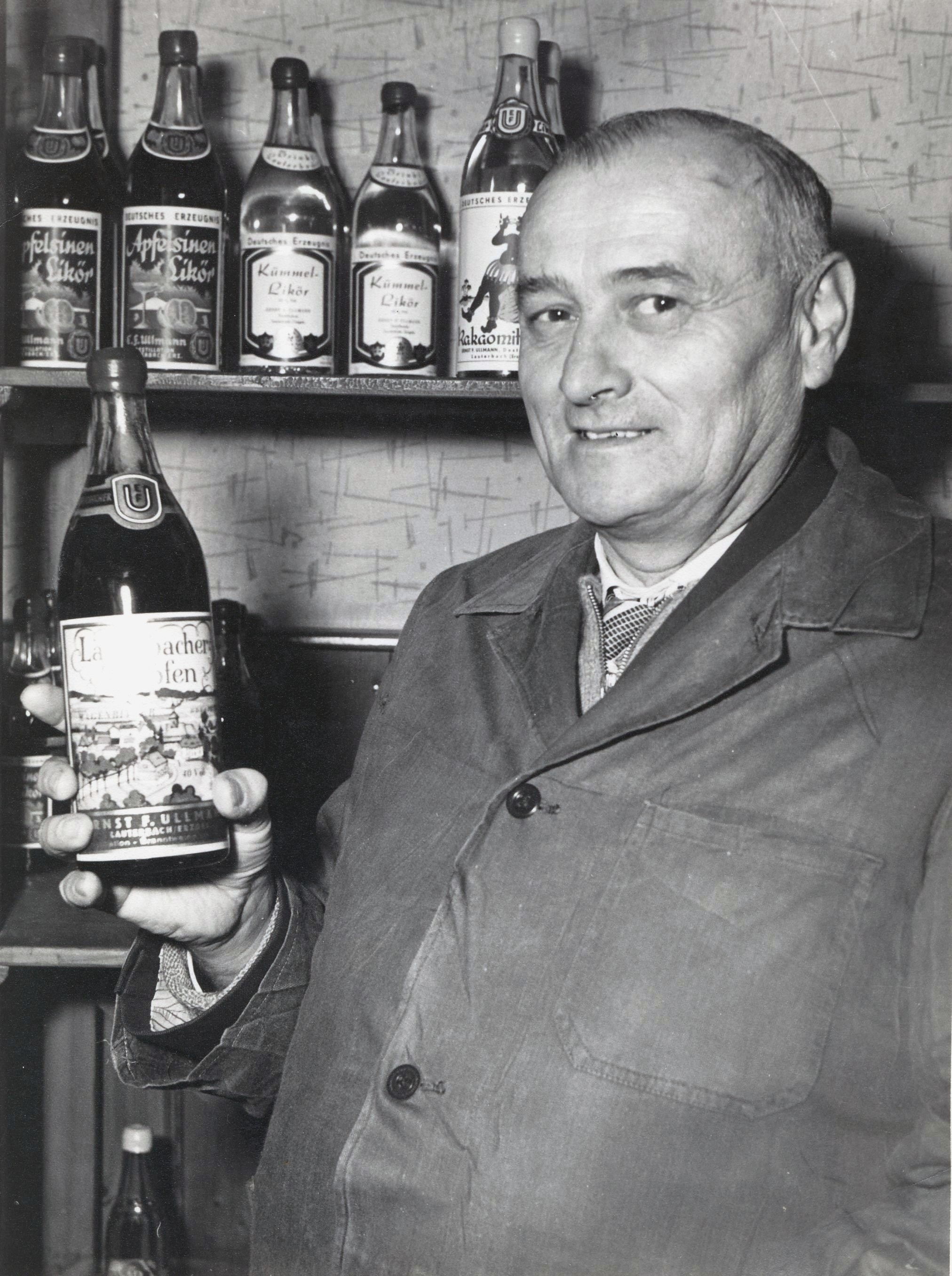 Ernst F. Ullmann junior präsentiert seinen Magenbitter (1950er Jahre)